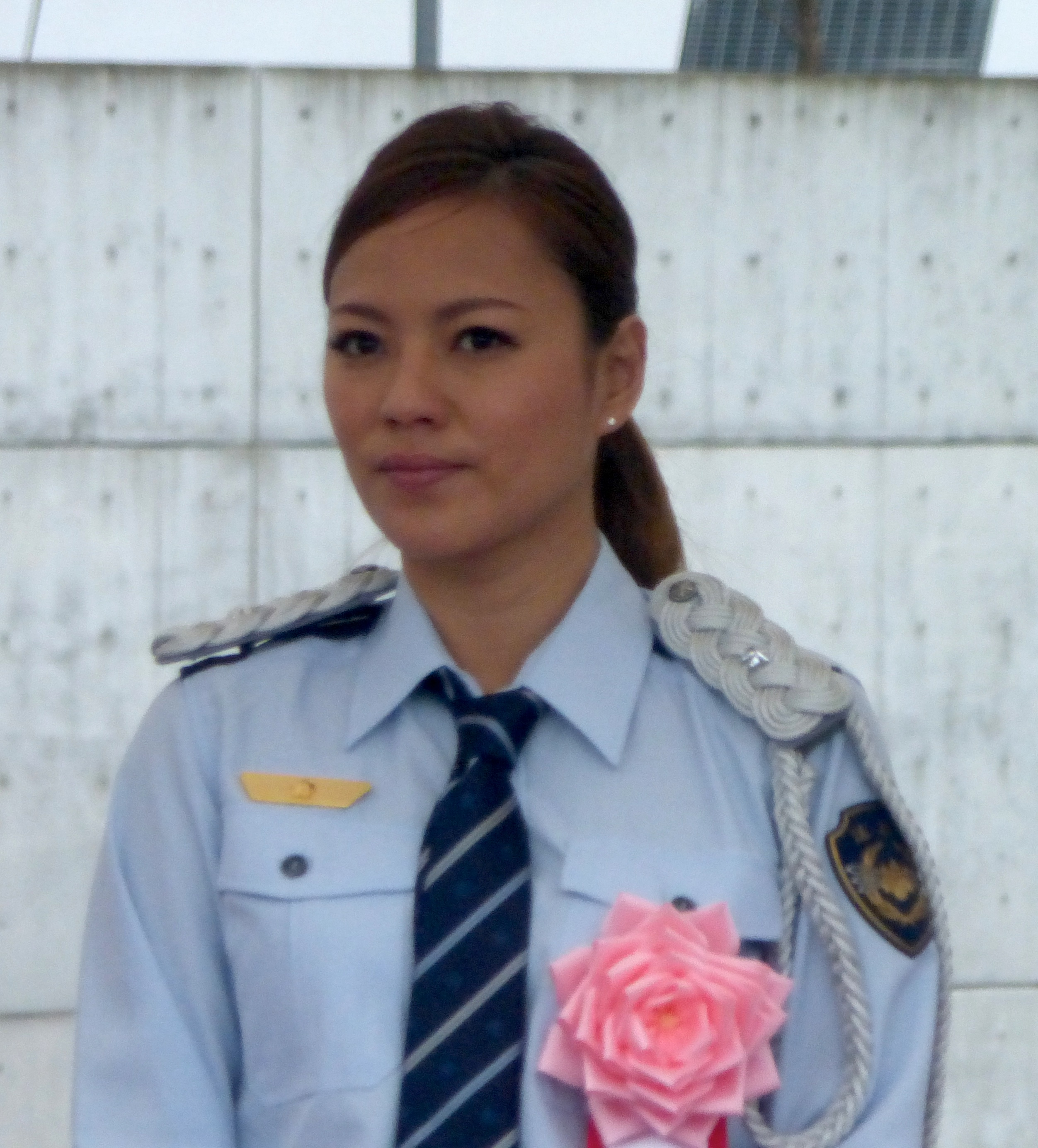 MAX（マックス）は、日本の音楽グループ。東京拘置所にて